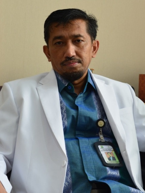 Andani Eka Putra Patriot Militan di Tengah Pandemi